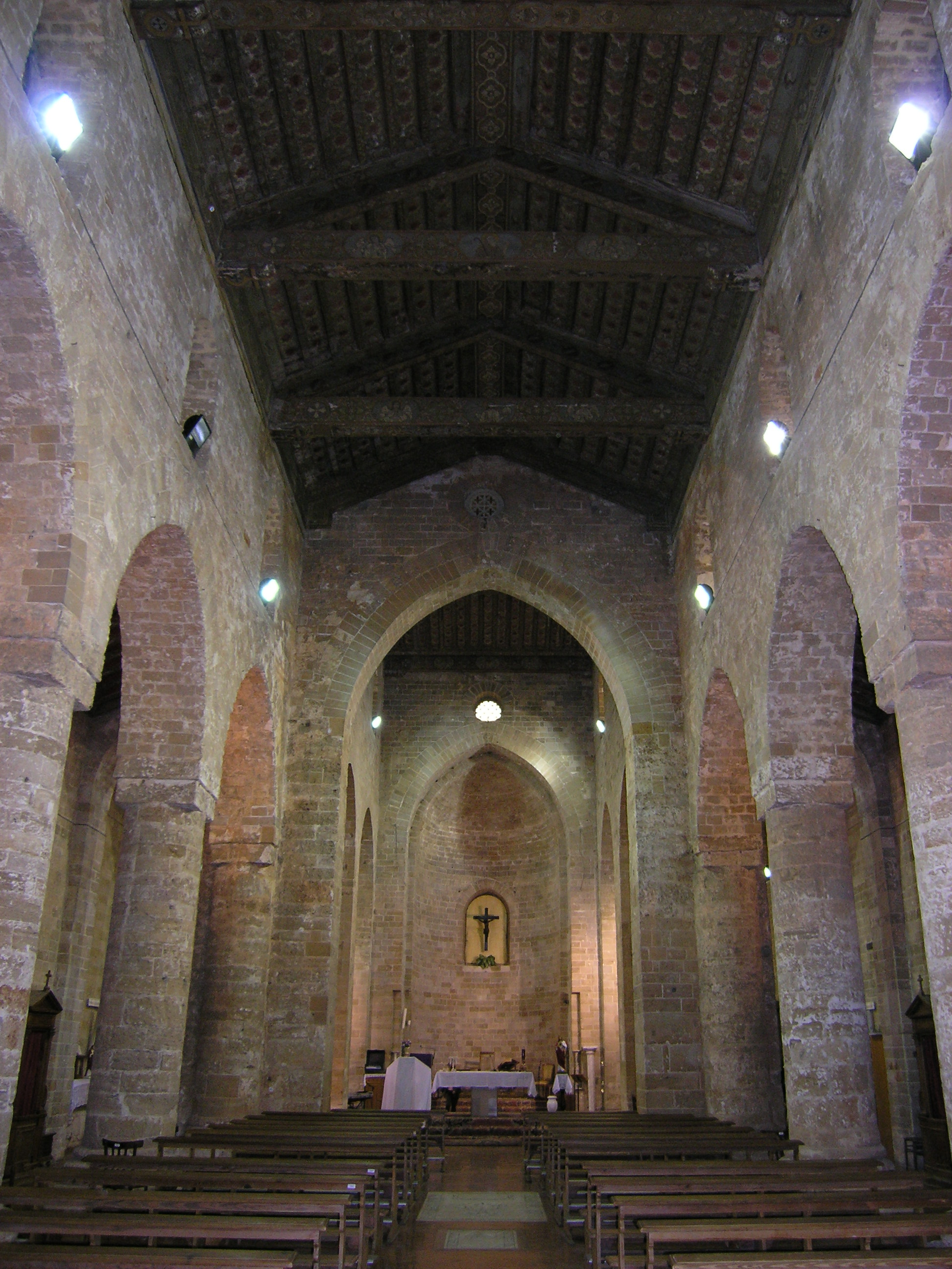 Sicilianu: Crèsia di Santu Spìritu